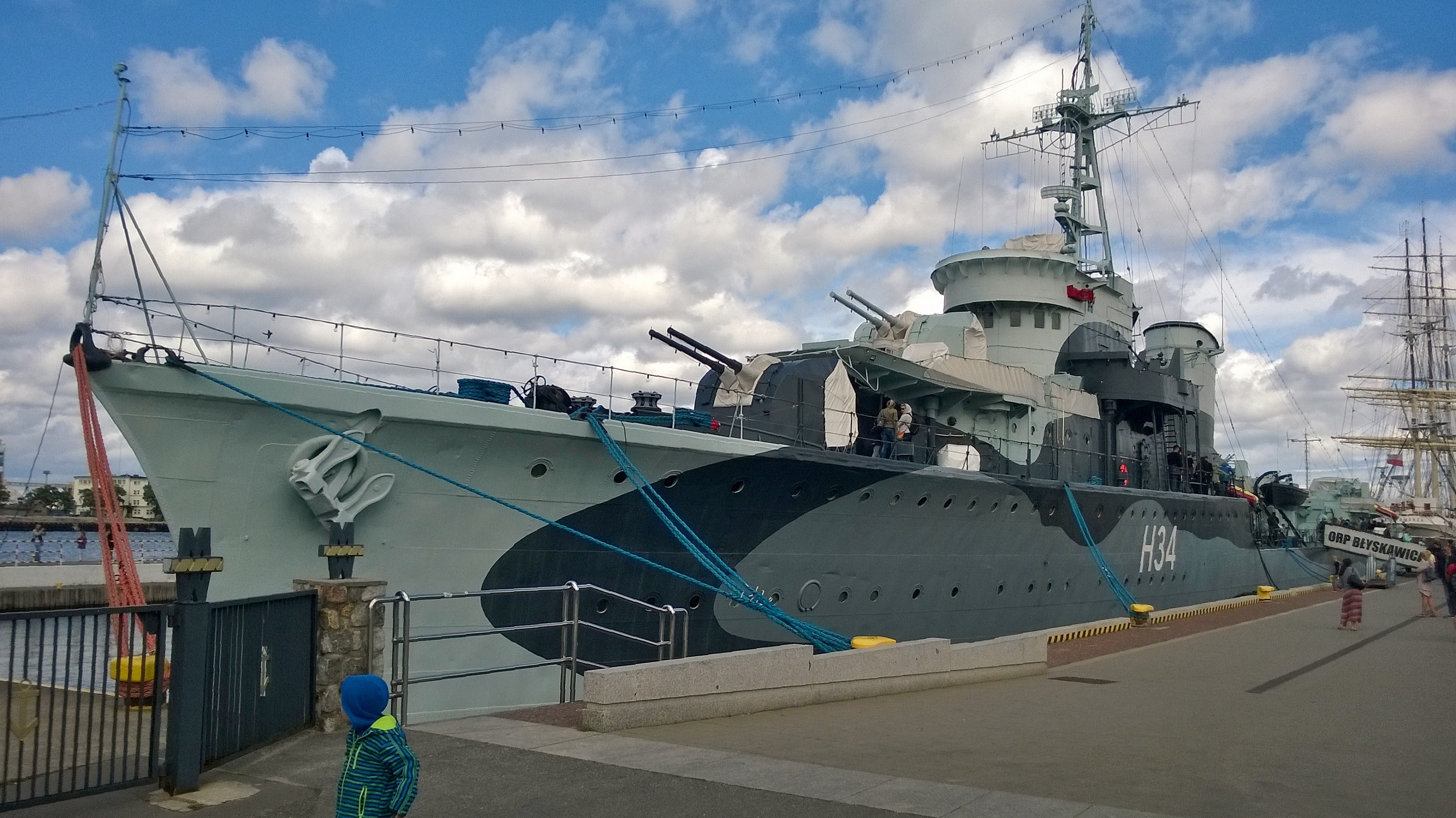 Śródmieście, Gdynia, Poland